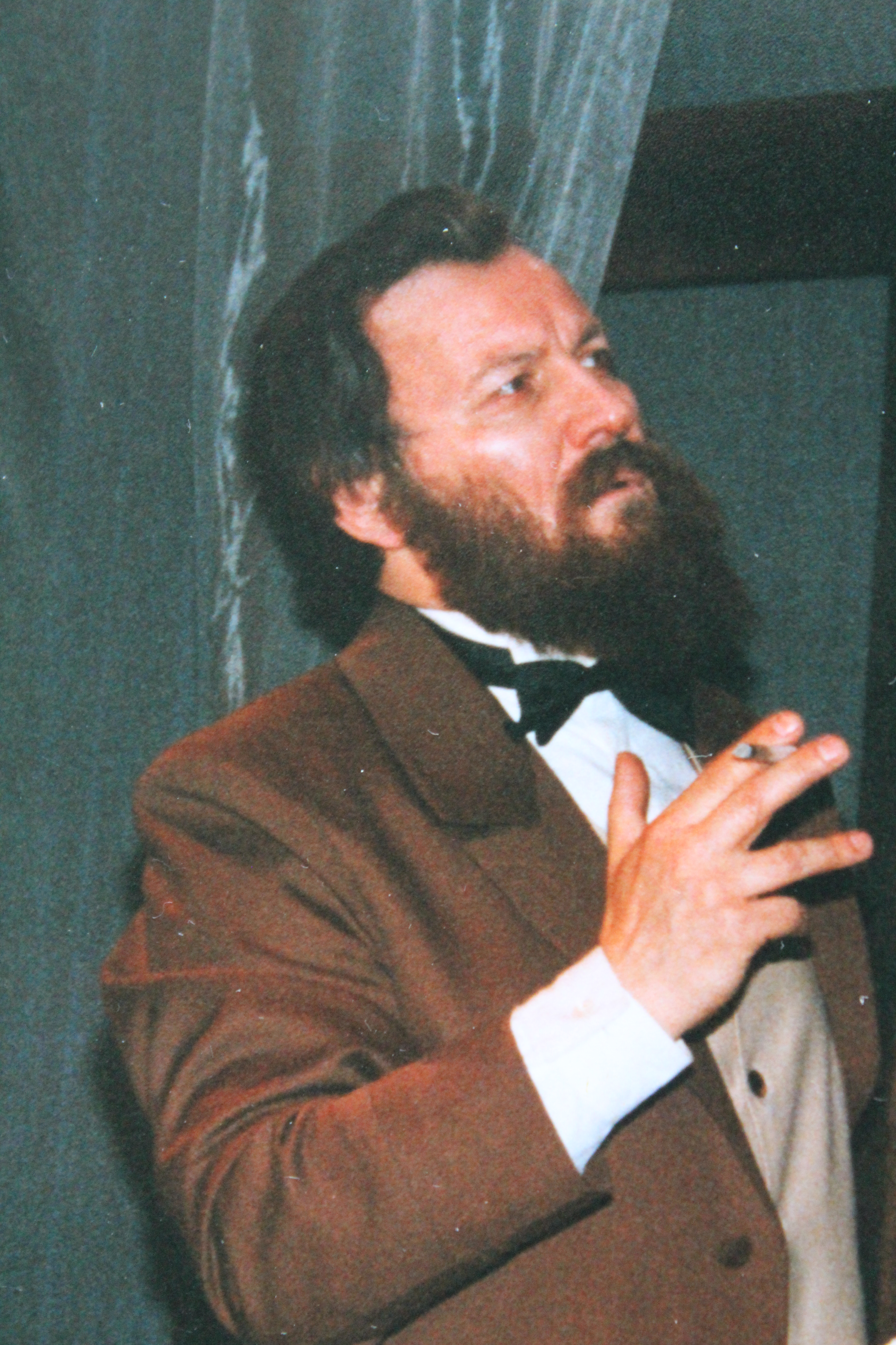 Сцена из спектакля «Дар Божий» Санкт-Петербургского драматического театра «Патриот» РОСТО. В роли Фёдора Михайловича Достоевского Геннадий Егоров.